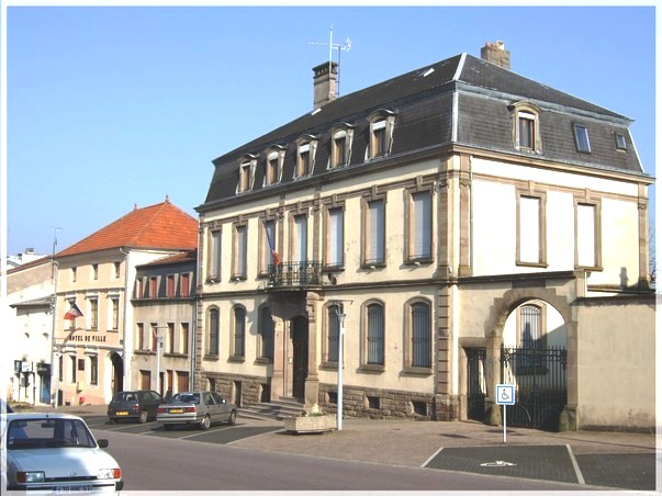 Vue de la Sous-Préfecture et de la Mairie de Château-Salins